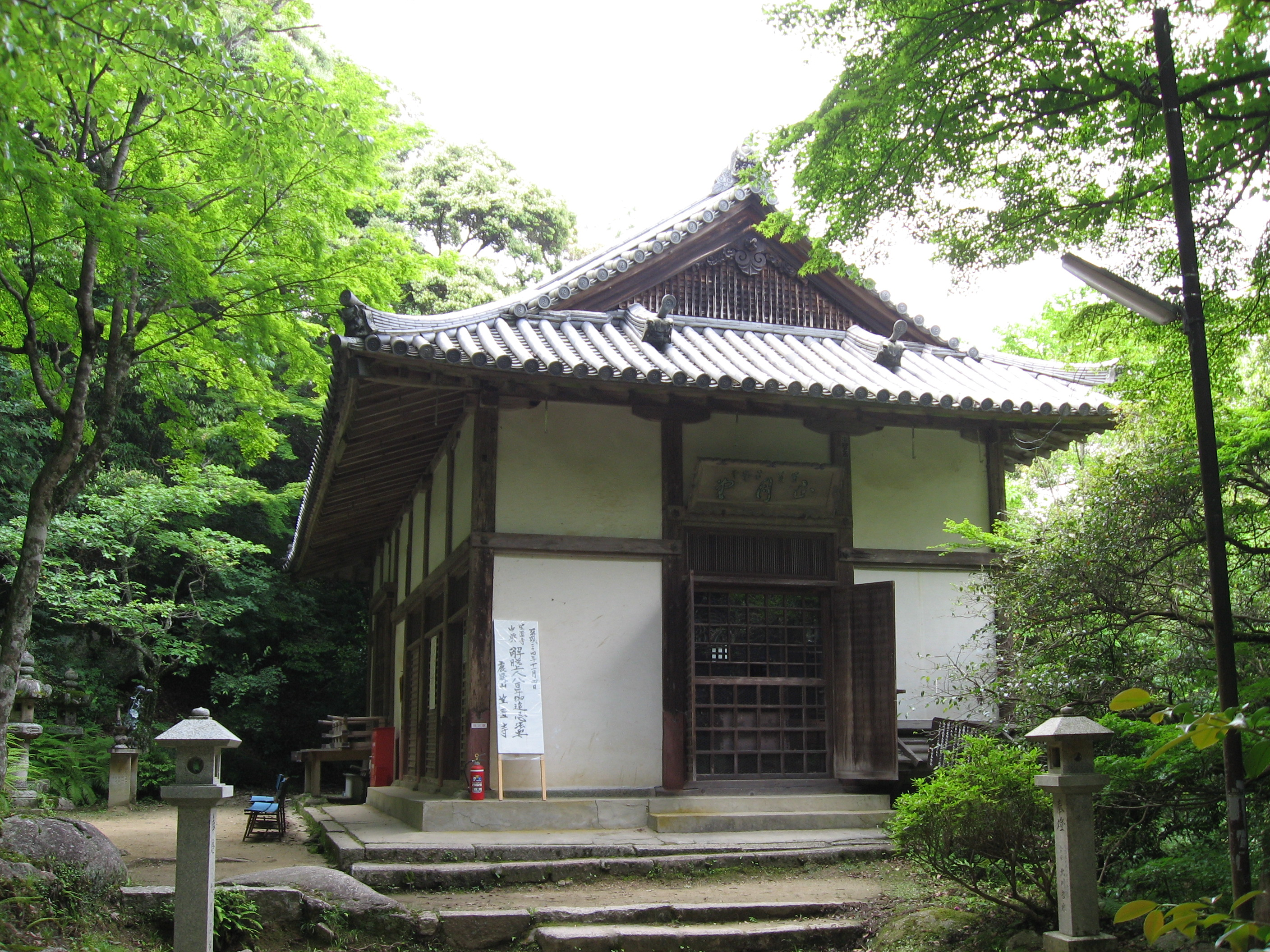 正月堂（笠置寺、本尊礼堂）